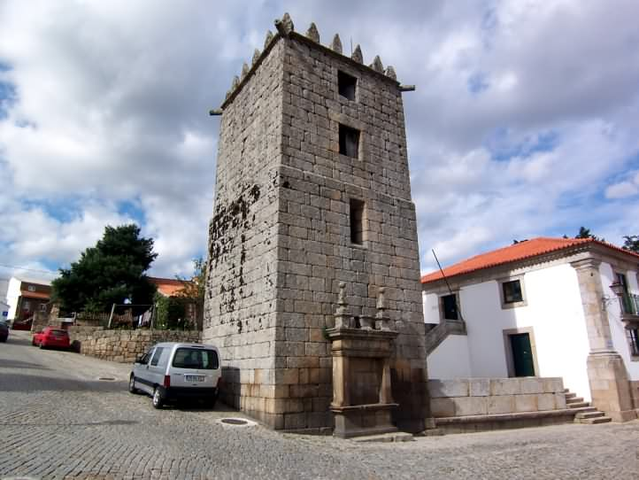 Torre do Relógio ou Torre Ameada Vila de Aguiar da Beira